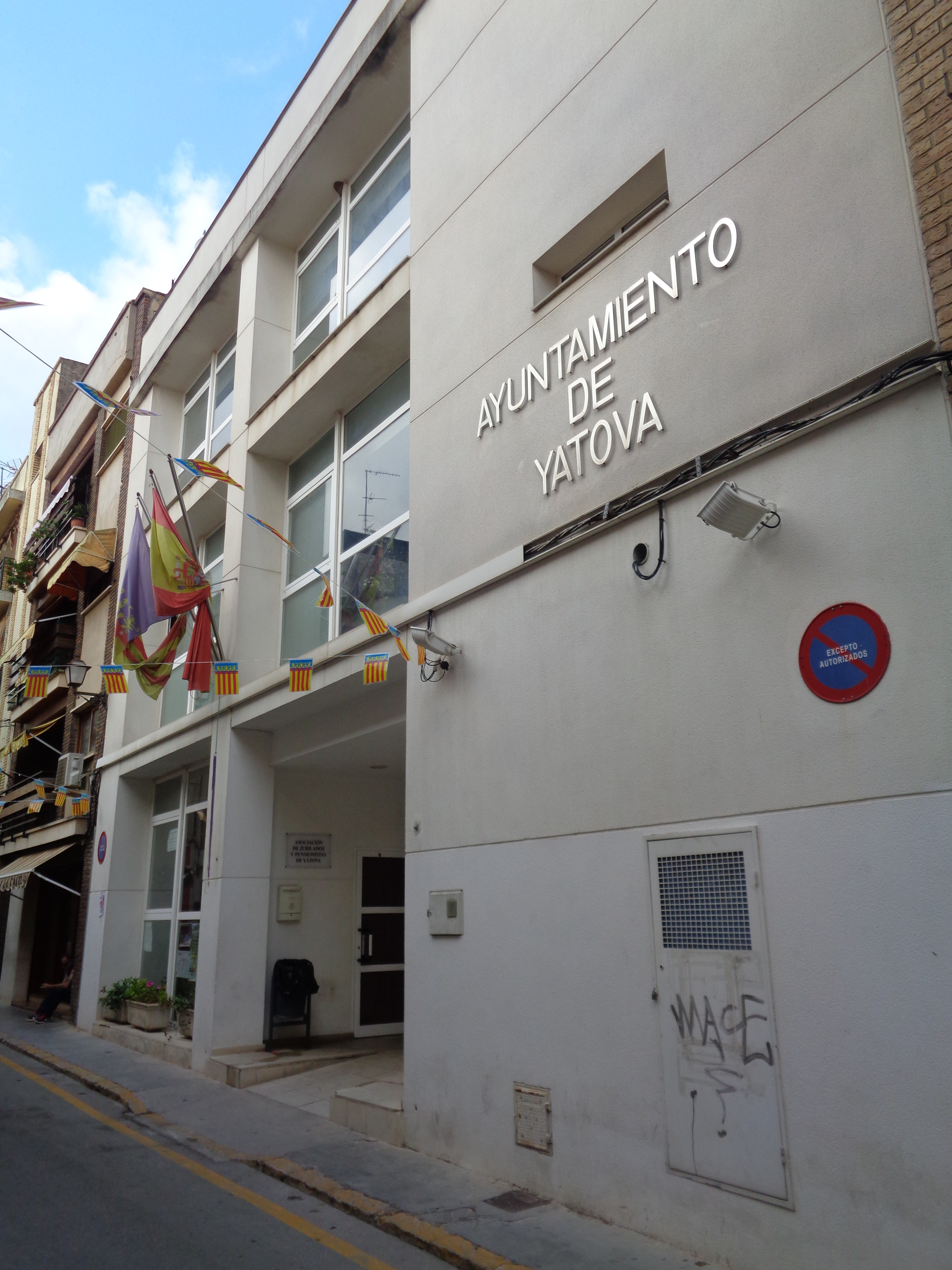 Iàtova.